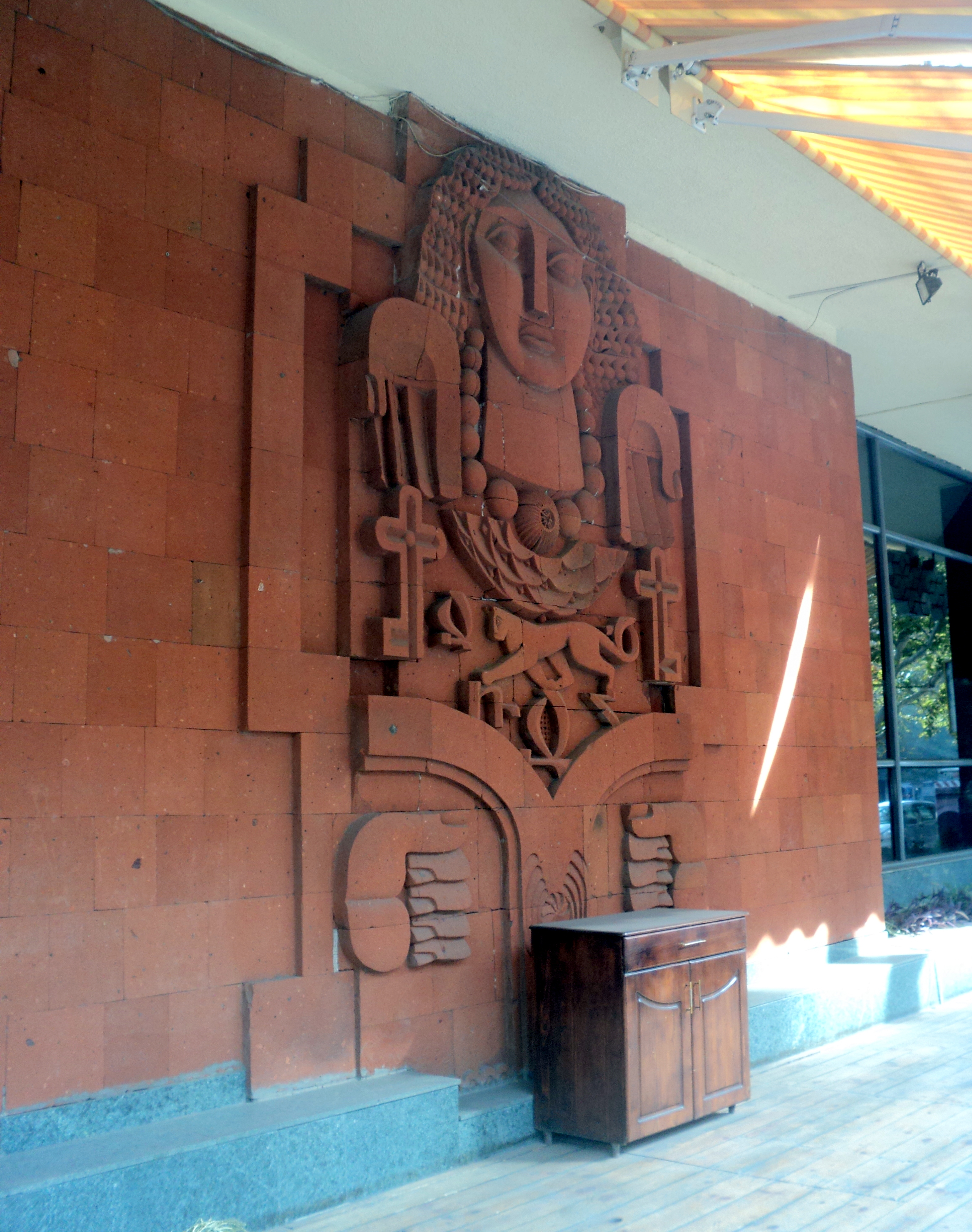 Երևանի Անի հյուրանոցի ճակատի բարձրաքանդակ, հեղինակ Երվանդ Գոջաբաշյան